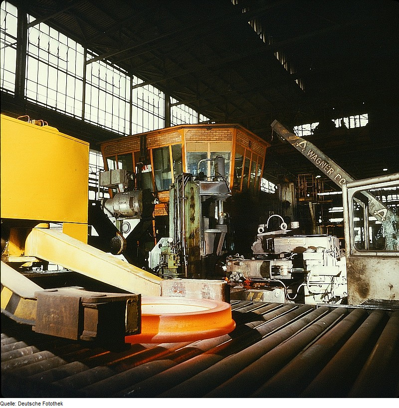 Original image description from the Deutsche Fotothek Metallurge für Walzwerktechnik